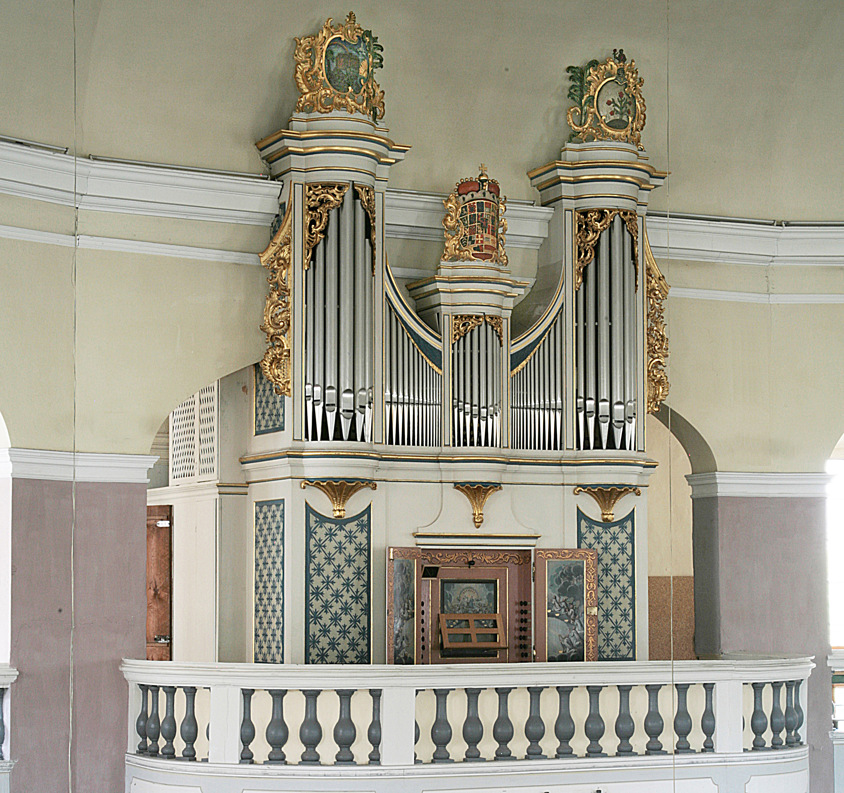 Orgel der Hugenottenkirche Erlangen, Bayern, Deutschland